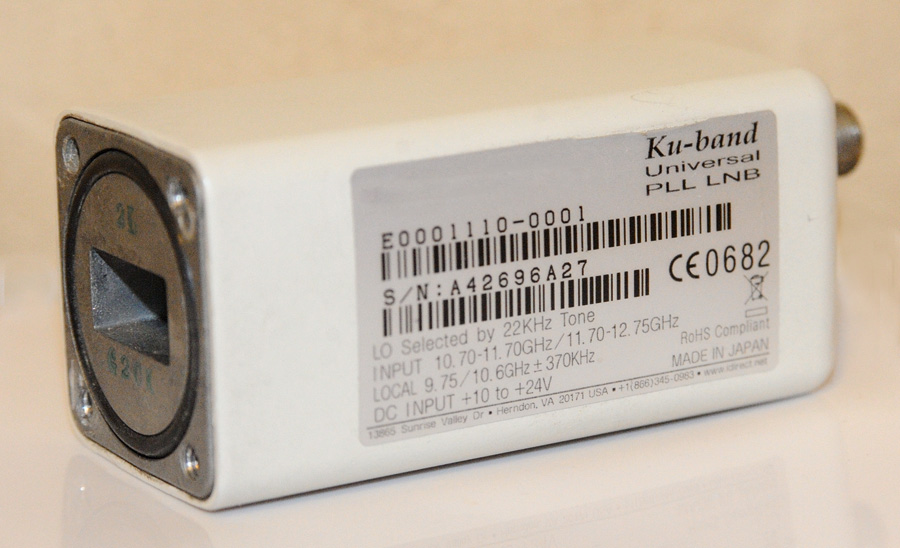 Двухдиапазонный переключаемый конвертер Ku-диапазона